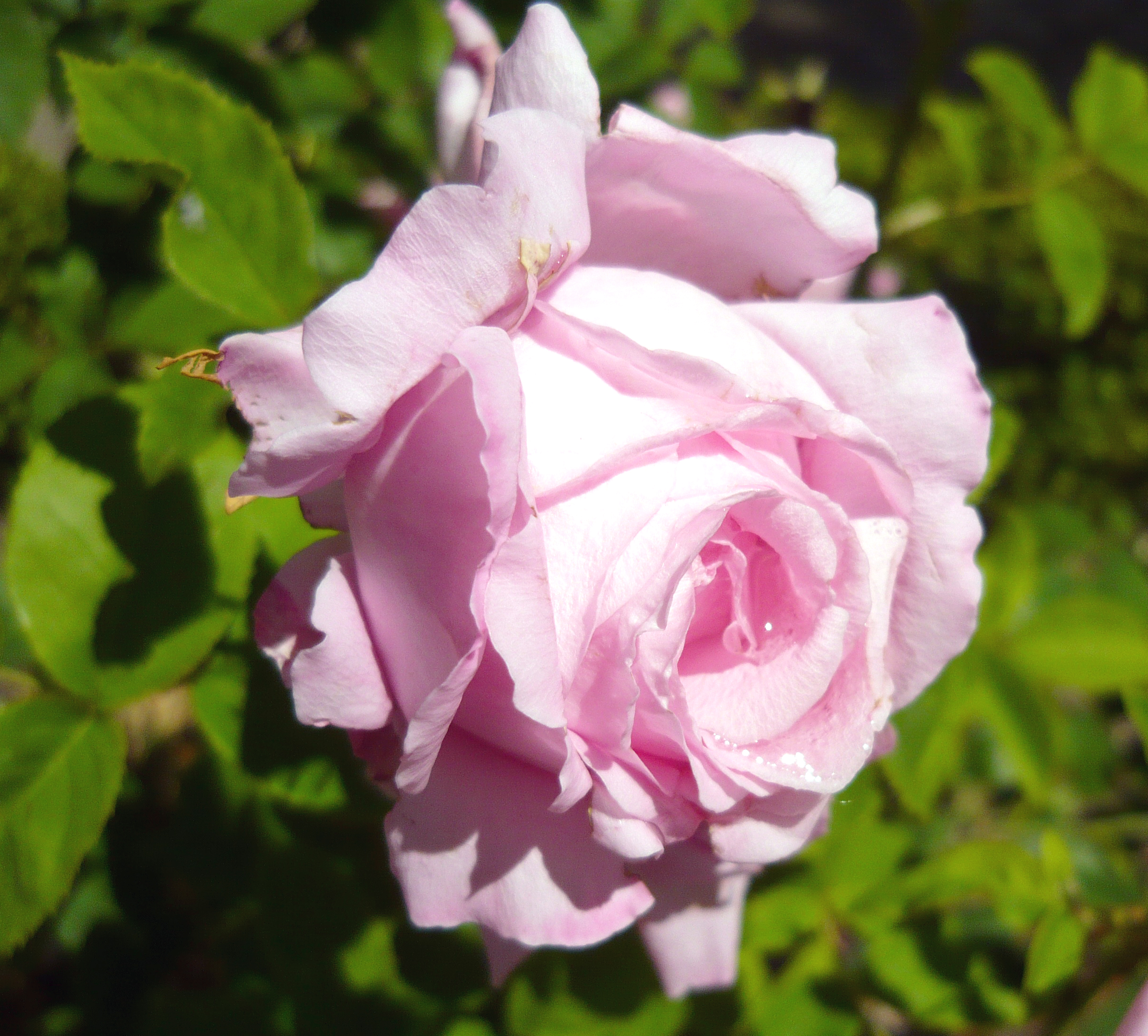 Rosa 'Coupe d'Hébé'. Real Jardín Botánico de Madrid.